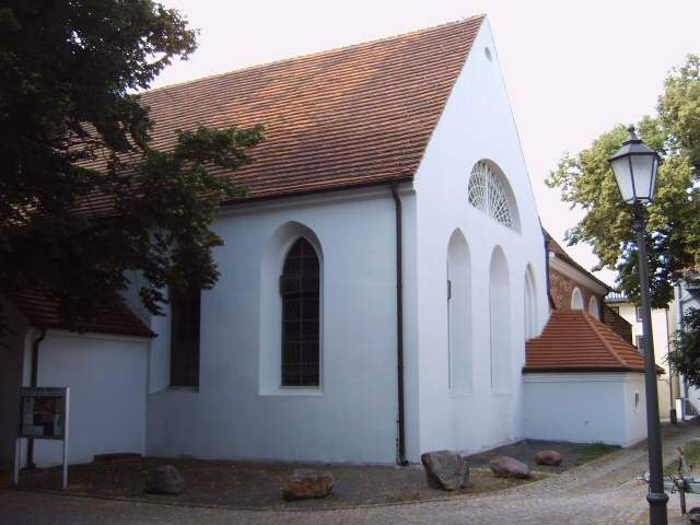 Wendisch-Deutsche Doppelkirche in Vetschau, Land Brandenburg, Deutschland wendische Kirche mit Sakristei Bild aufgenommen am 26.6.2006 von Olaf Meister